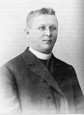 Josef Sakař (1870 - 1937), Český katolický kněz, pedagog a historik.